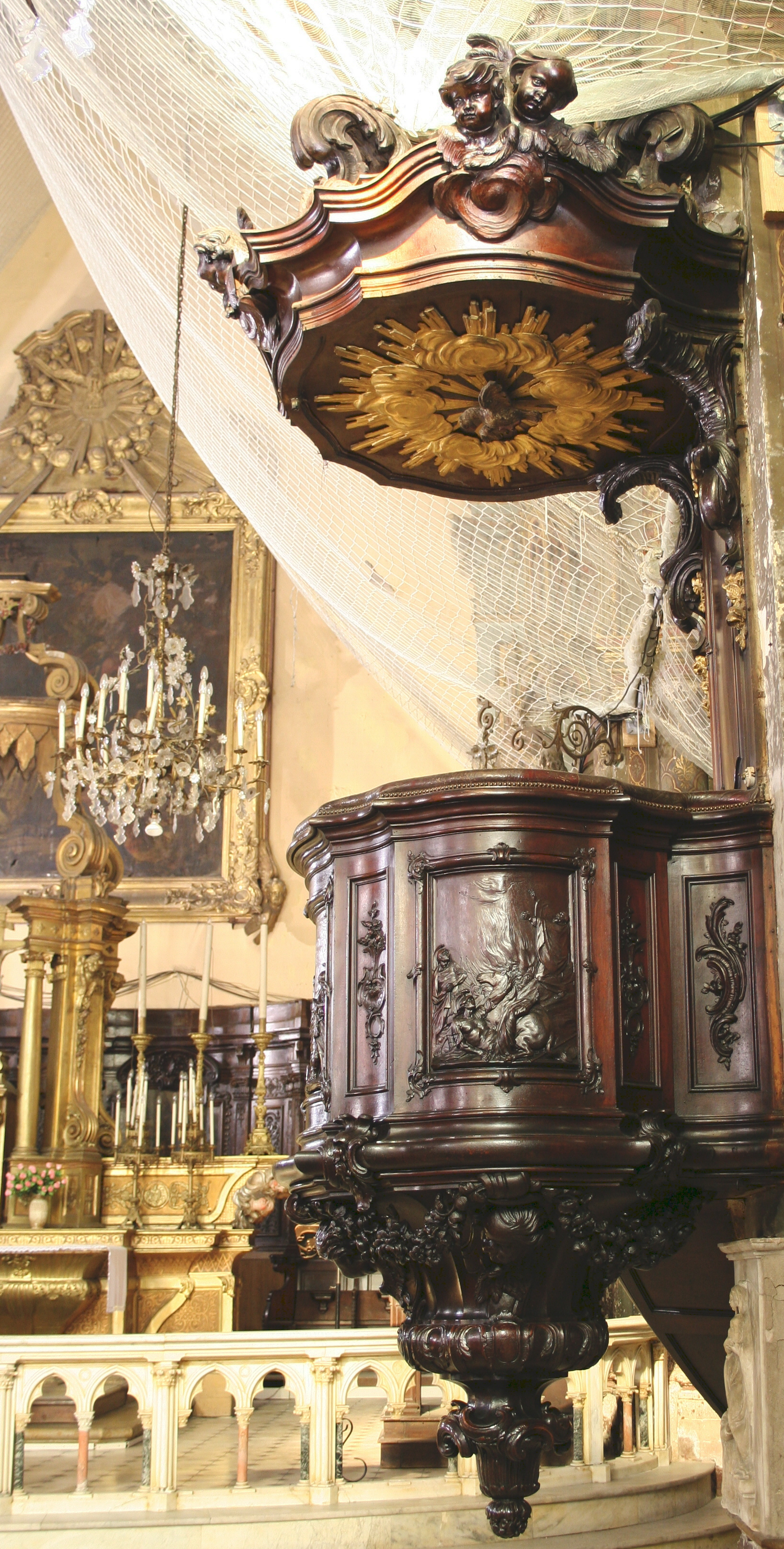 Chaire de l'église des Grands-Carmes à Marseille de l'école Pierre Puget.